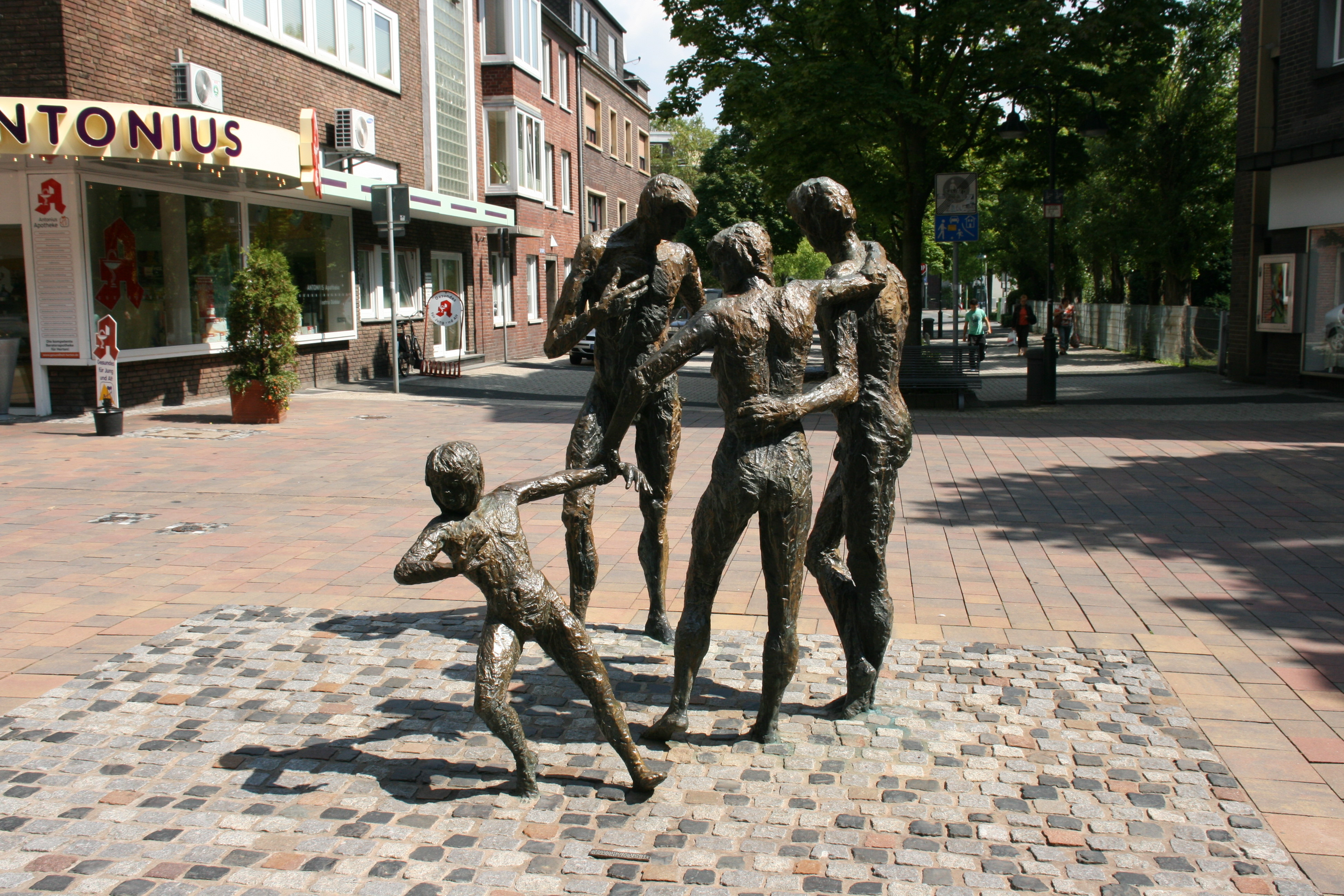 „Kommunikation“ von Heinrich Brockmeier, Ewaldstraße in Herten